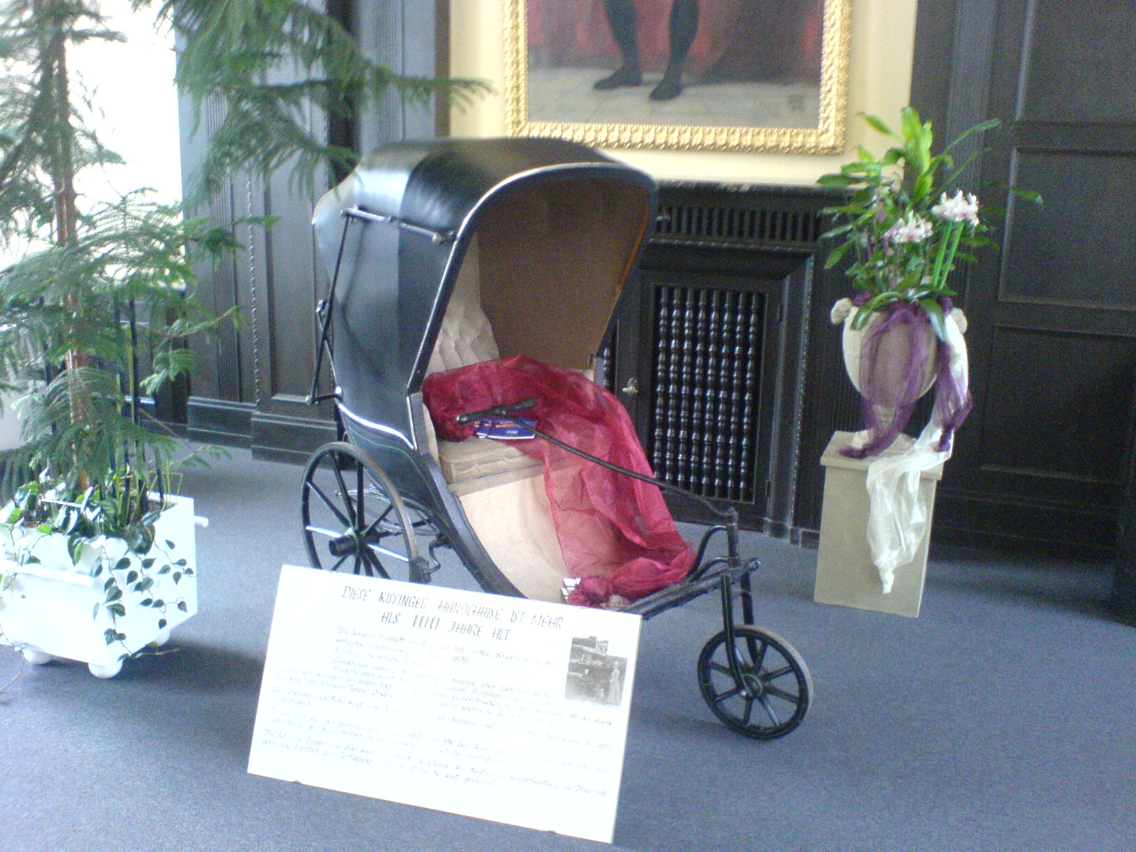 Bad Kissingen - Handchaise, um 1898 verwendet. Aussgestellt im Arkadenbau.